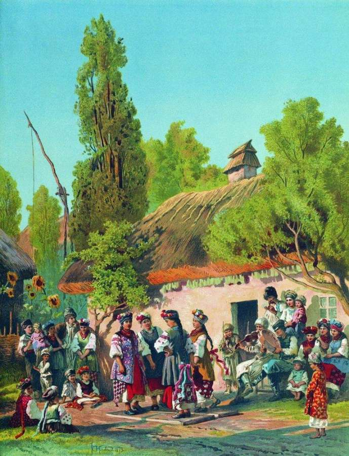 Воскресный вечер в малороссийской деревне 1879